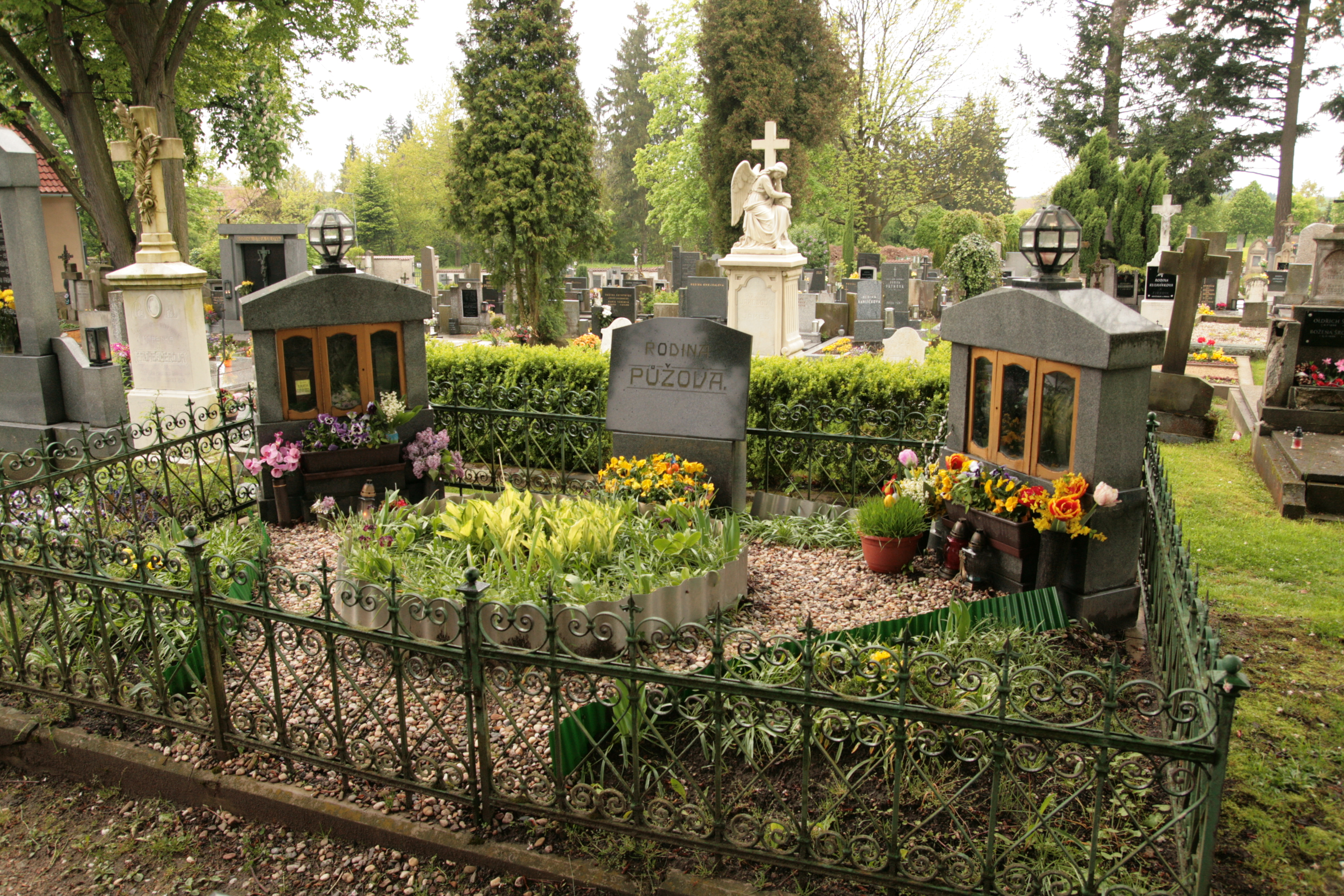 František Půža a jeho širší rodina pochovaná na hřbitově v Přibyslavi. Pohled od jihovýchodu.